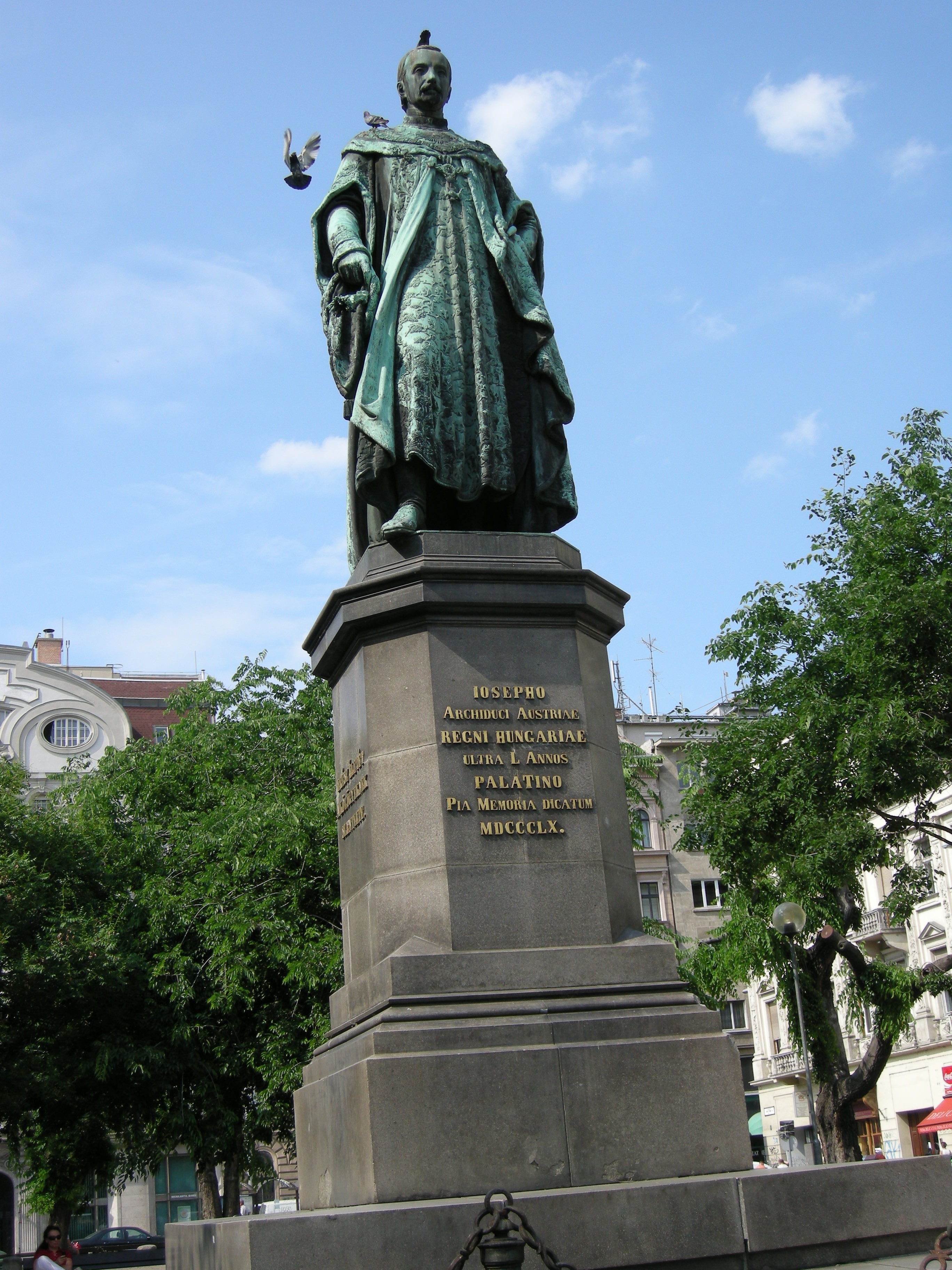 Budapest